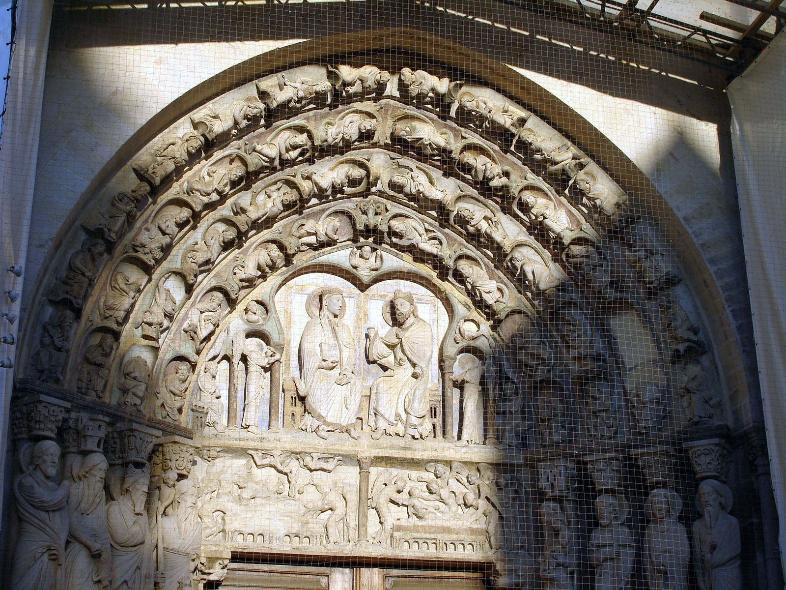 Le tympan du portail central de la cathédrale Notre-Dame de Senlis, Oise, France.